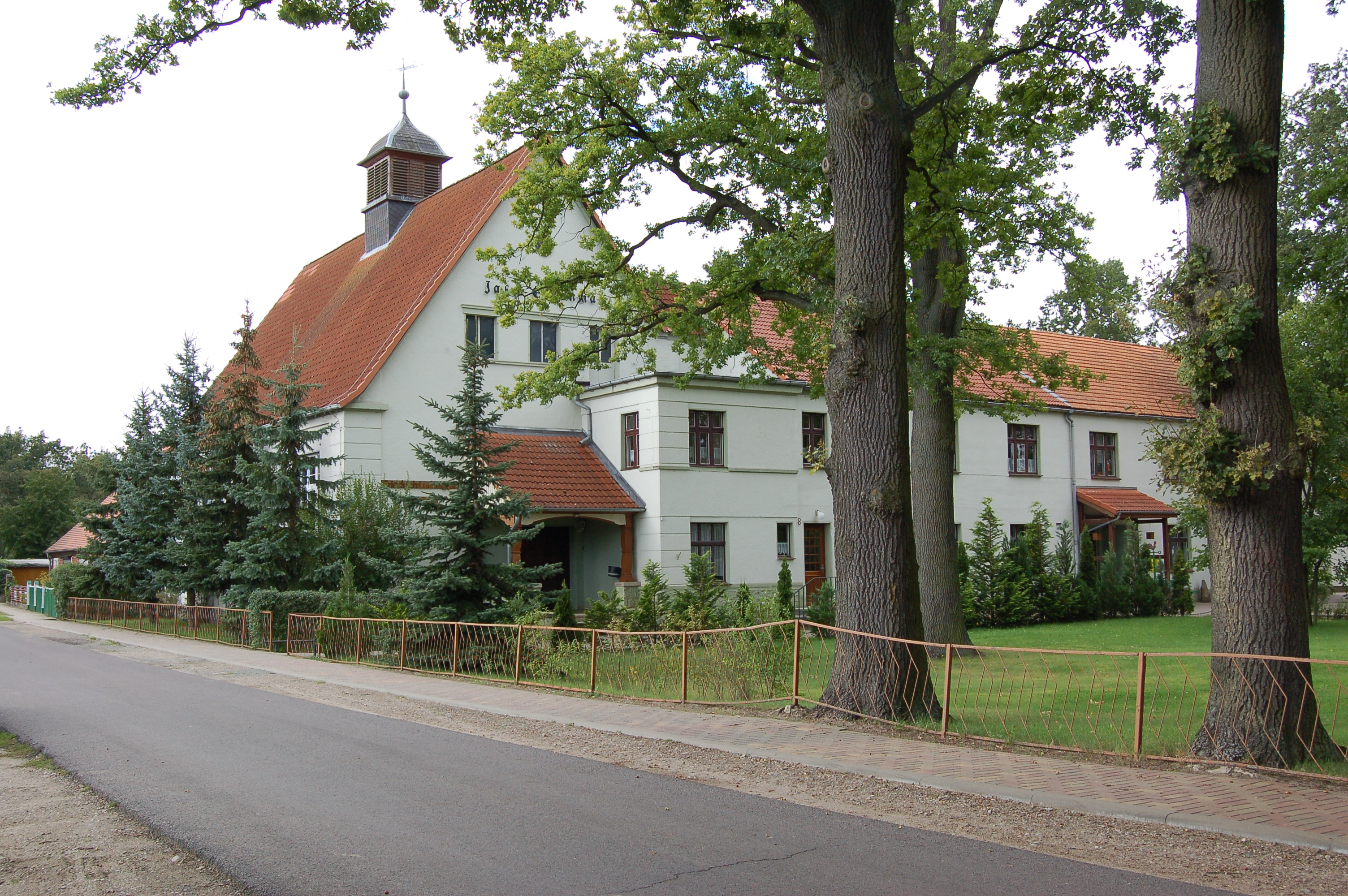 Jahn-Ehrenmal in Lanz (Prignitz), gebaut 1928 (als Jugendherberge mit Turnhalle), heute Grundschule Friedrich-Ludwig-Jahn im Hopfenweg 8